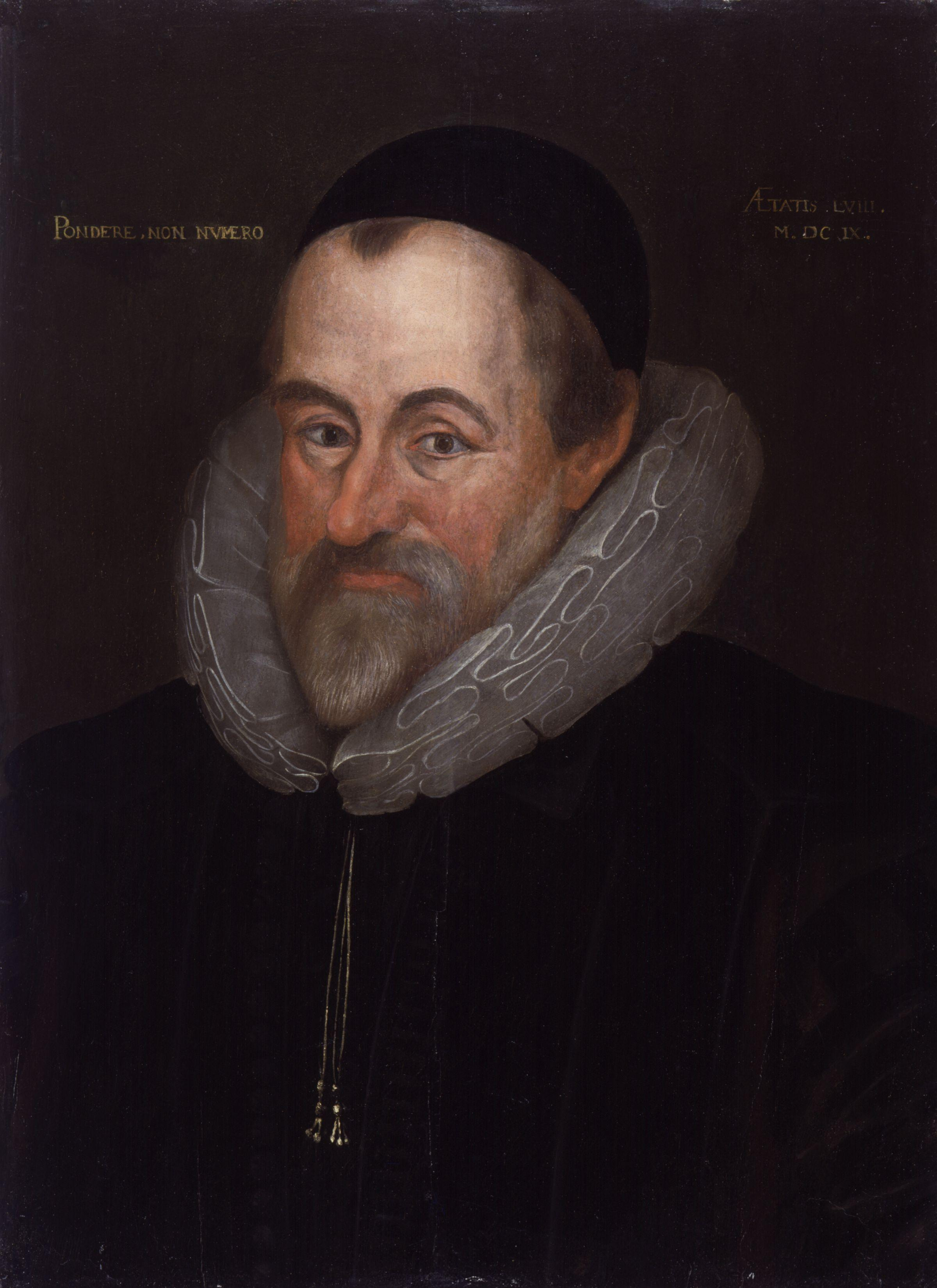 William Camden